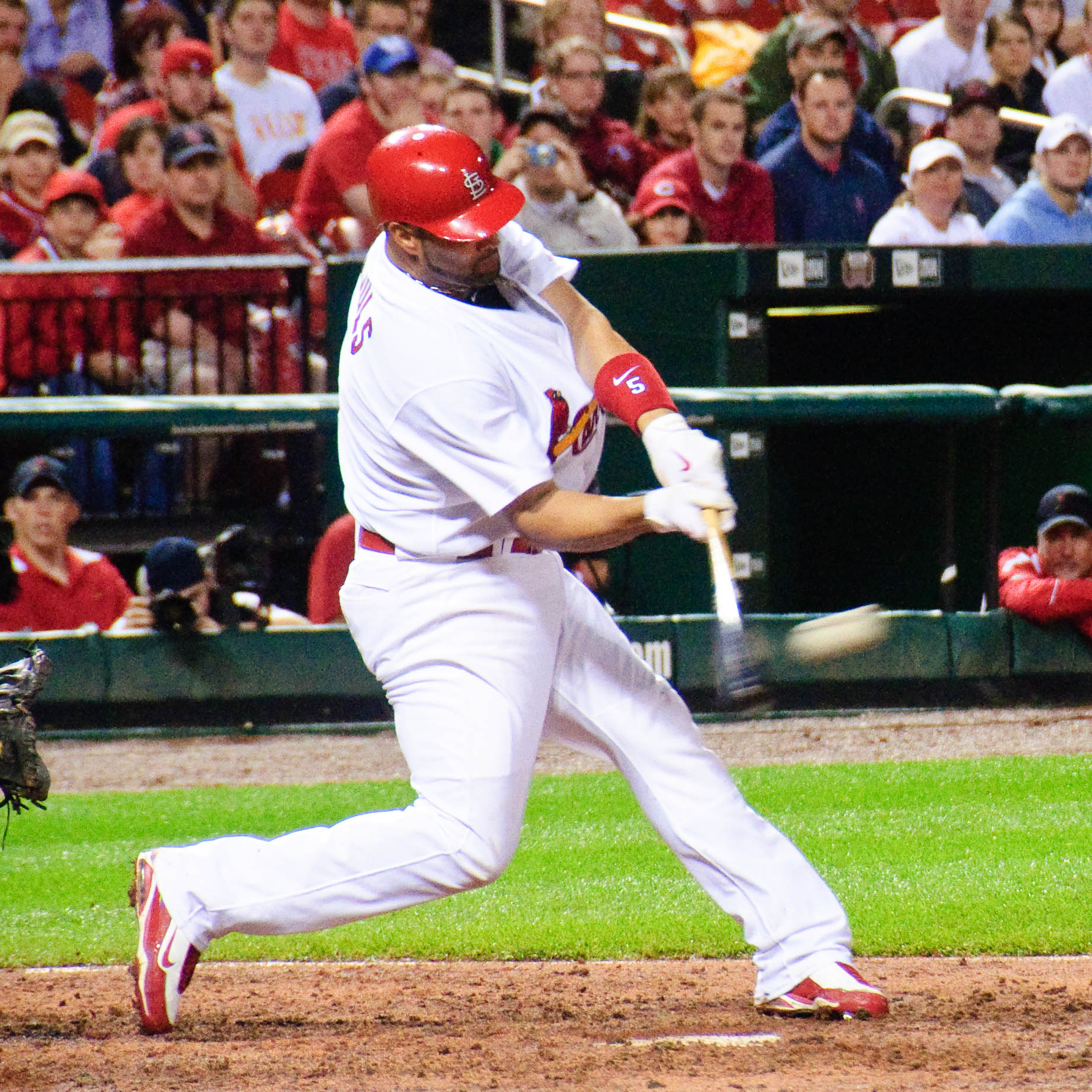 Albert Pujols